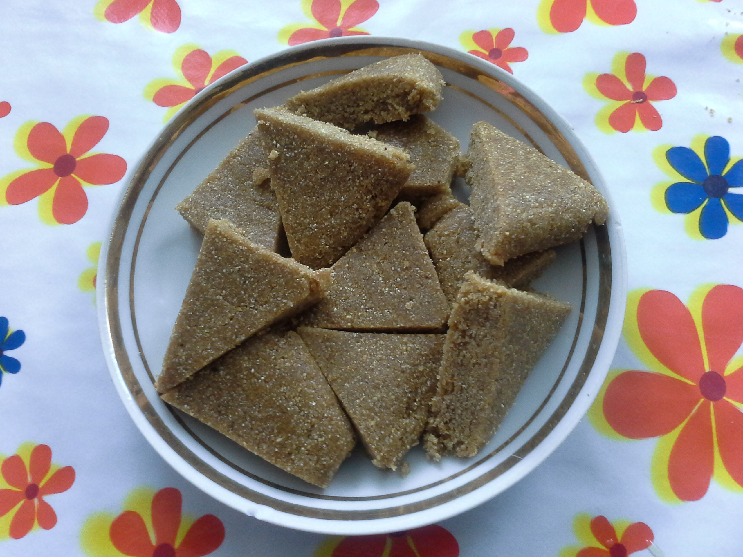 Готовый жент.